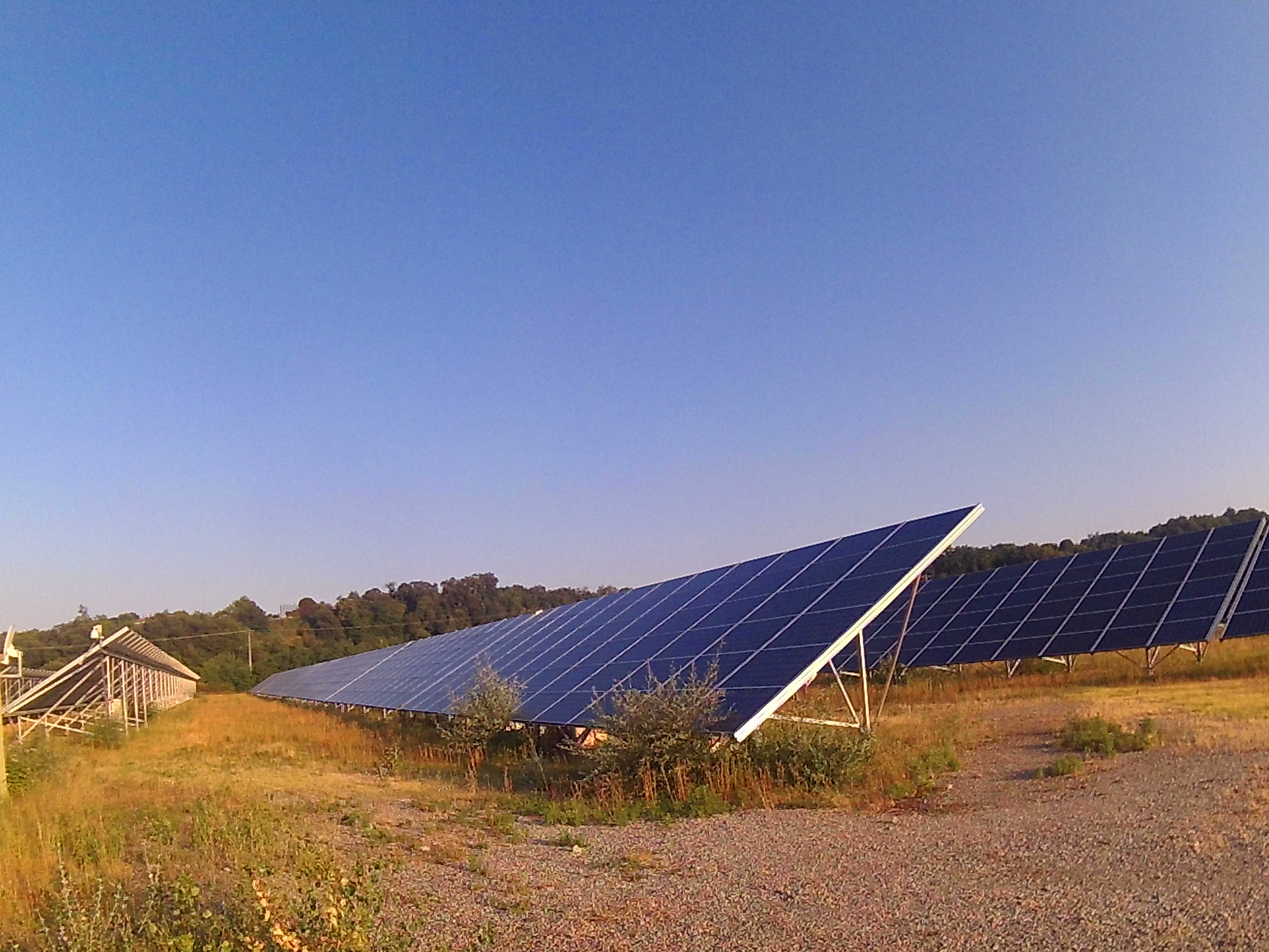 Ferme Solaire - Panneaux Solaire - Puissance globale : 6 MW sur un terrain de 11 ha